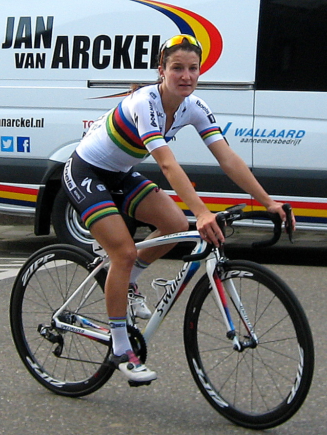 Winnares Lizzie Armitstead (Boels-Dolmans) na finish Holland Hills Classic 2016